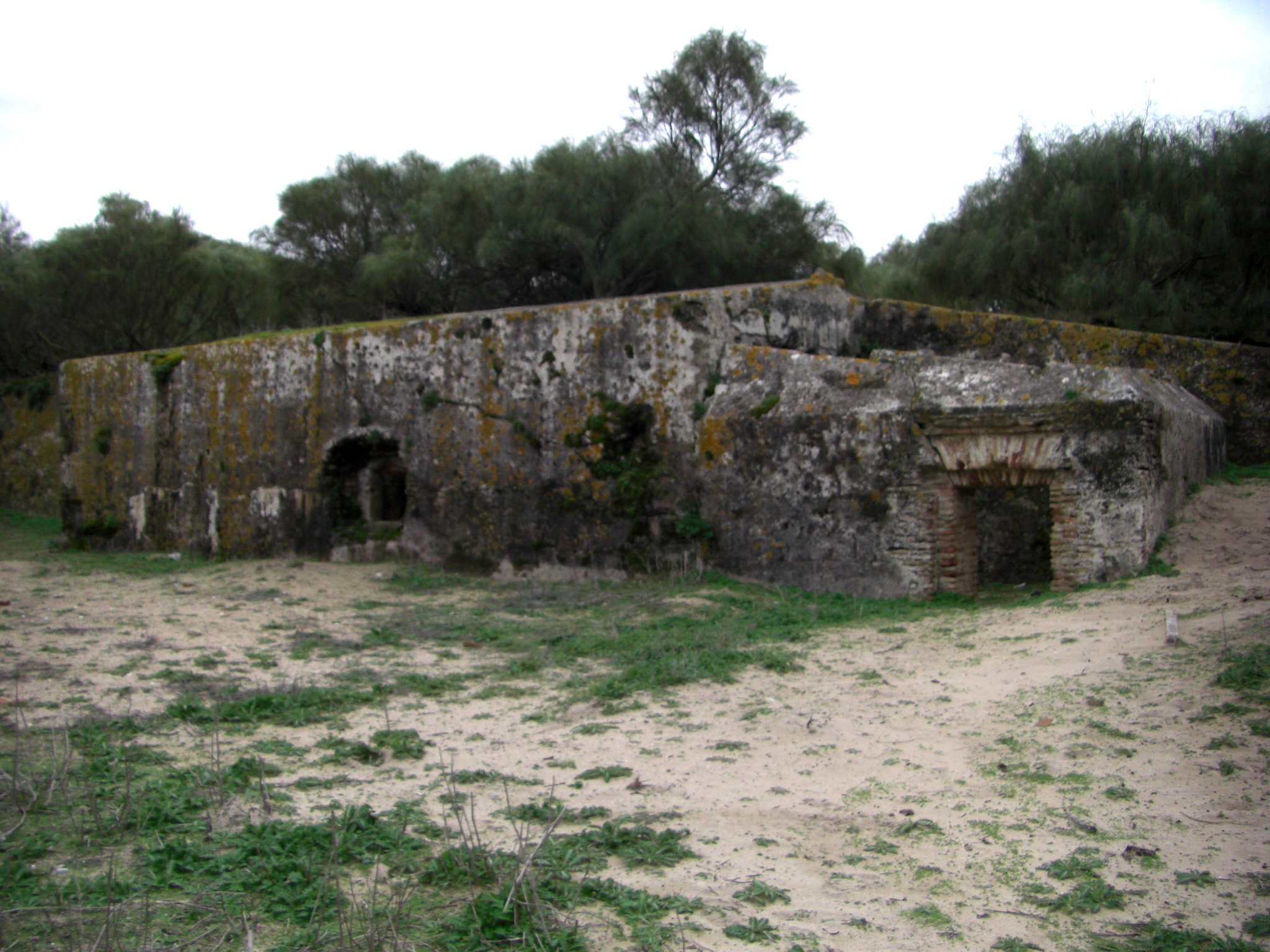 Bateria de San Genis